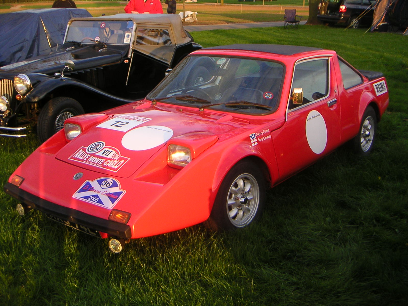 =1972 Clan Crusader